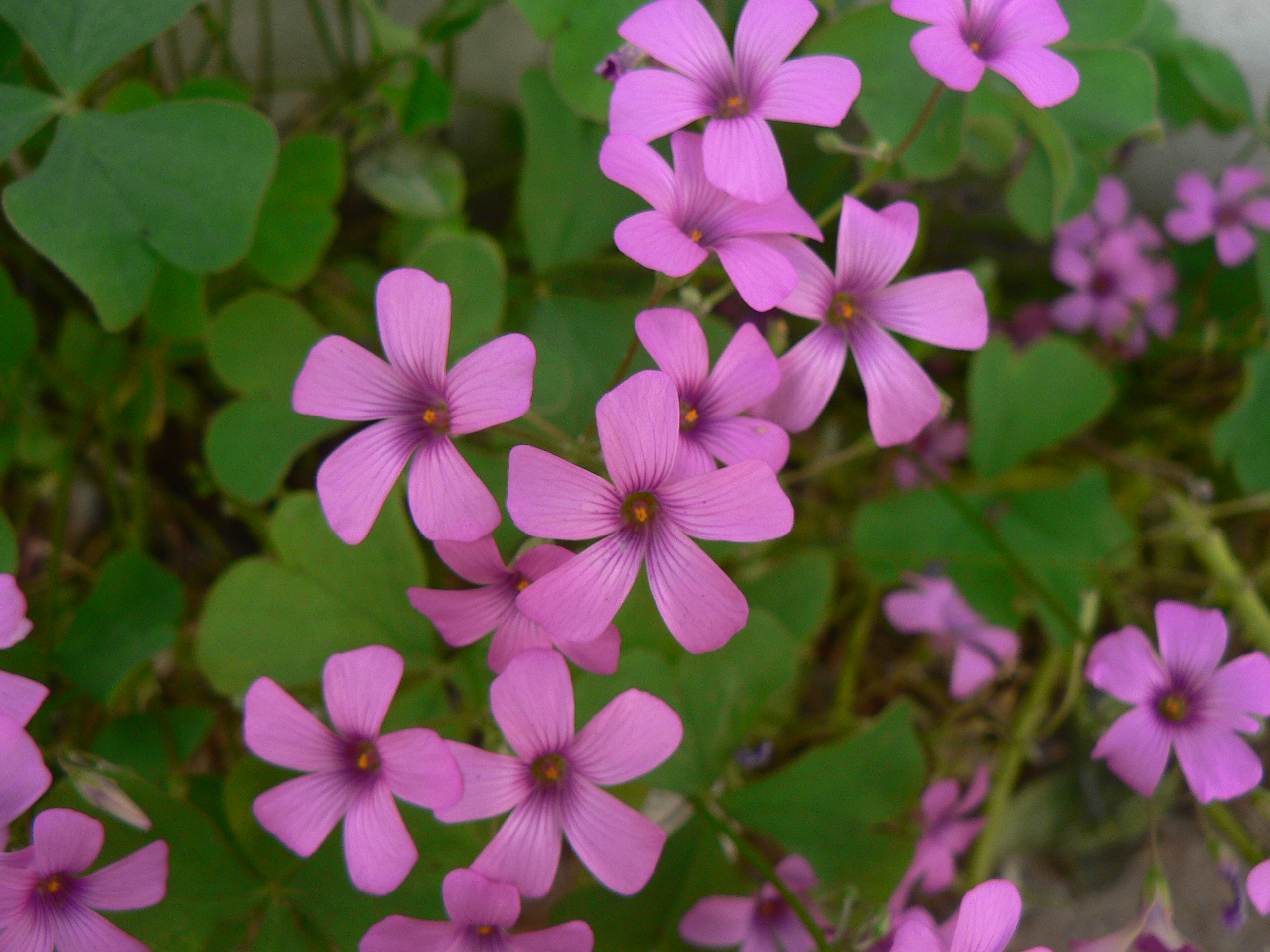 Oxalis חמציץ